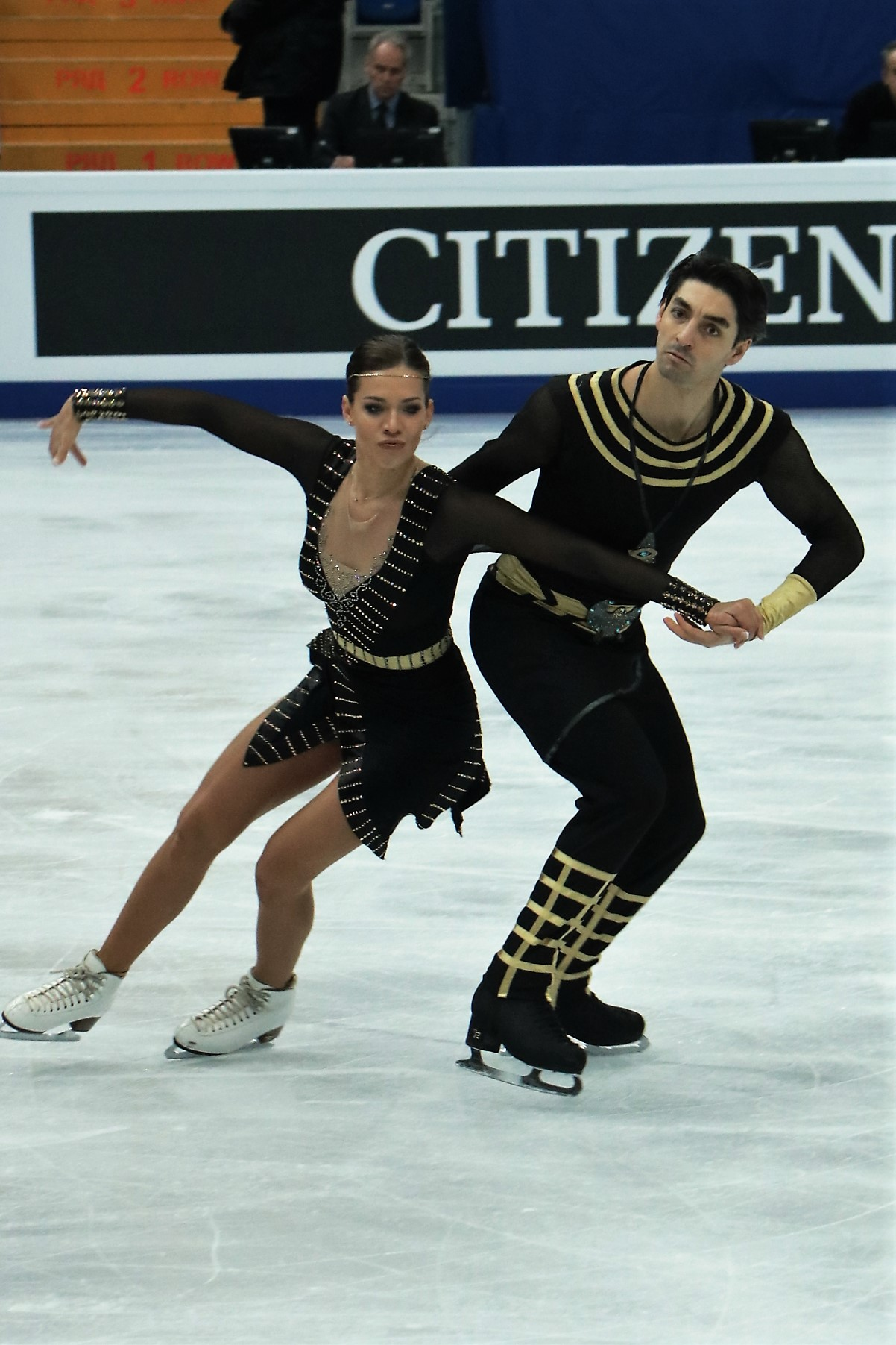 Алиса Агафонова / Альпер Учар (Турция) на Чемпионате Европы по фигурному катанию 2018.